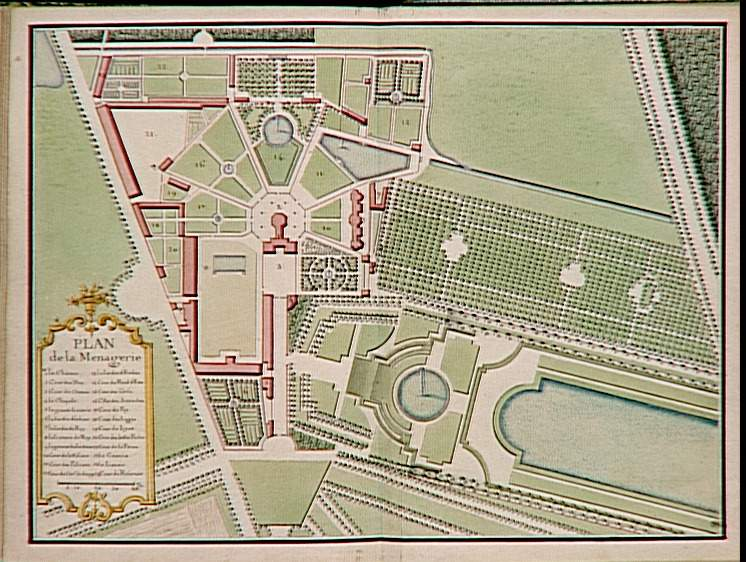 Plan de la ménagerie de Versailles sous Louis XV. Aquarelle de 0,215 x 0,305 m. de 1747